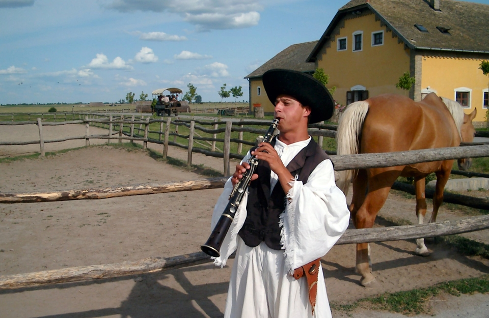 Puszta-Musikant.